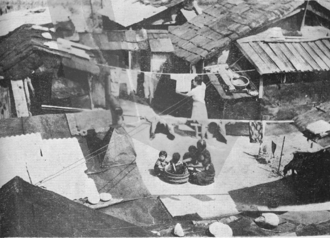 富山市安野屋のバラック